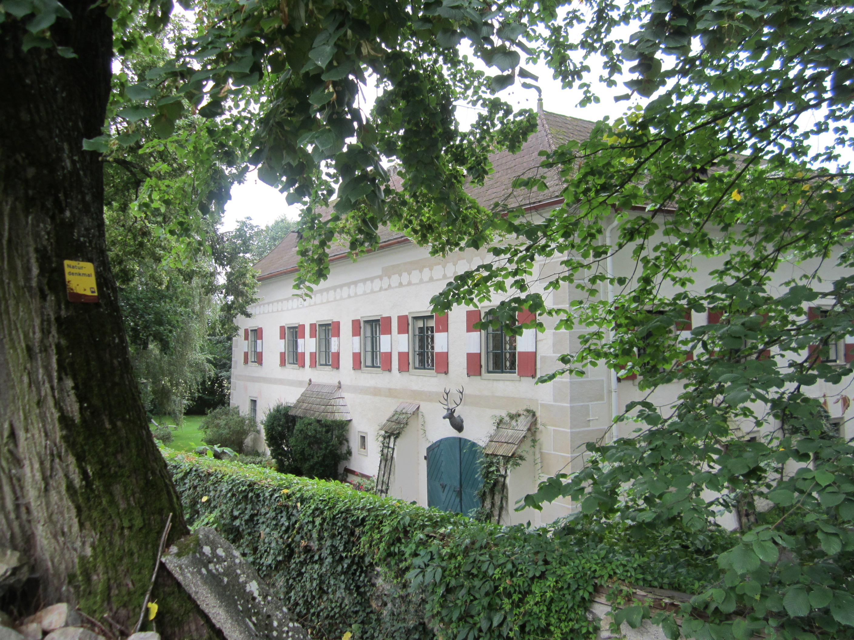 Ehemaliges Wasserschloss aus dem 16. Jahrhundert. Zweigeschossige Vierseitanlage. Object location48° 46′ 48.65″ N, 15° 14′ 54.89″ E This media shows the natural monument in Lower Austria with the ID WT-046.